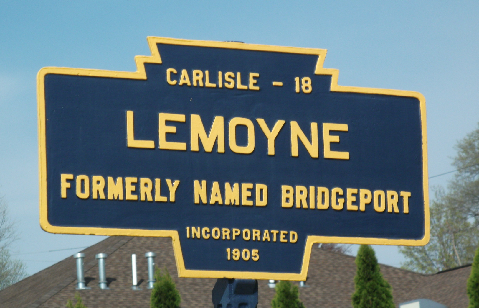 Keystone Marker for Lemoyne, Pennsylvania